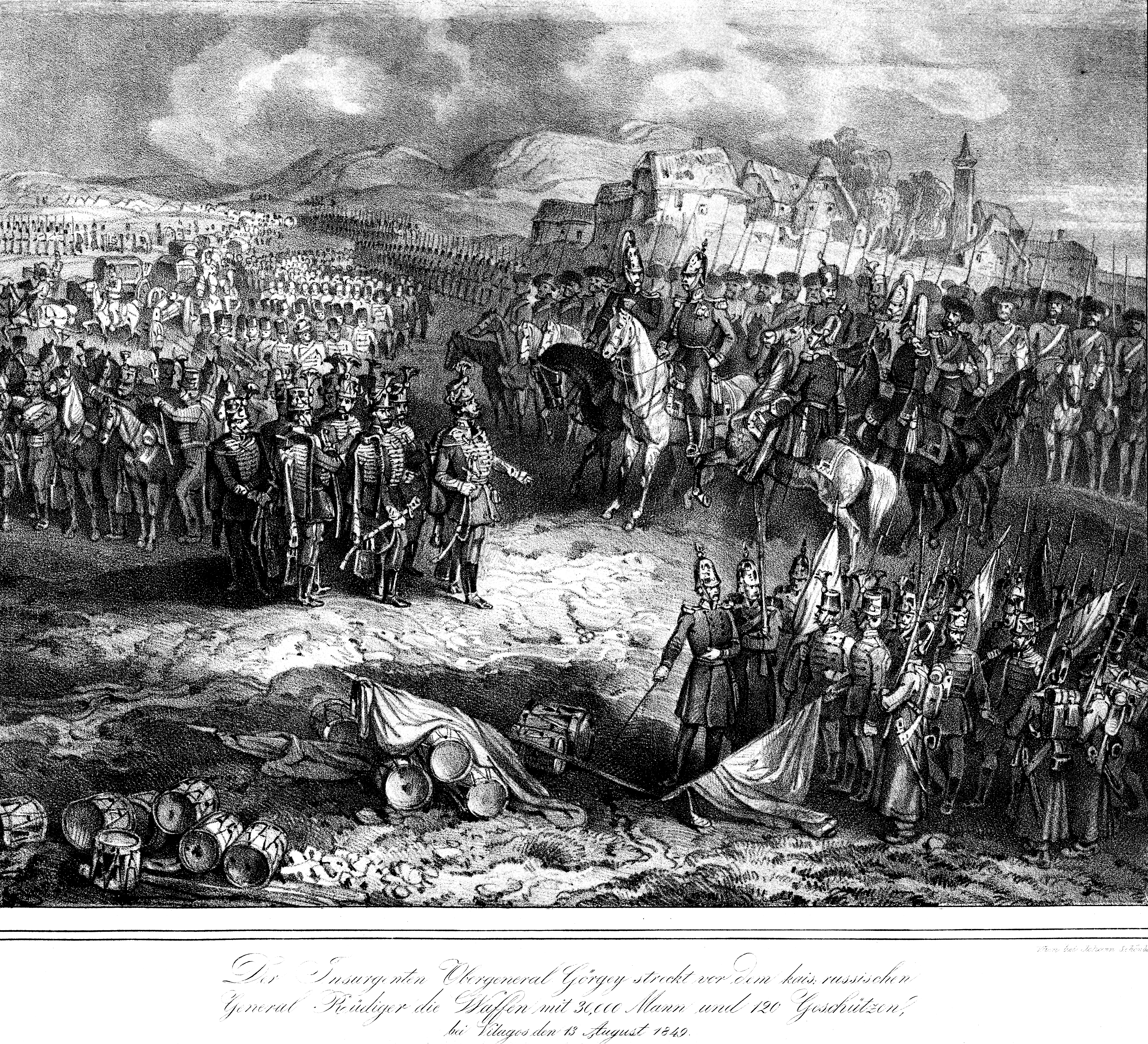 A világosi fegyverletétel az 1848–49-es forradalom és szabadságharc végét jelentette, amely után az osztrákok részéről véres megtorlás következett Julius Jacob von Haynau osztrák hadvezér rémuralma alatt.